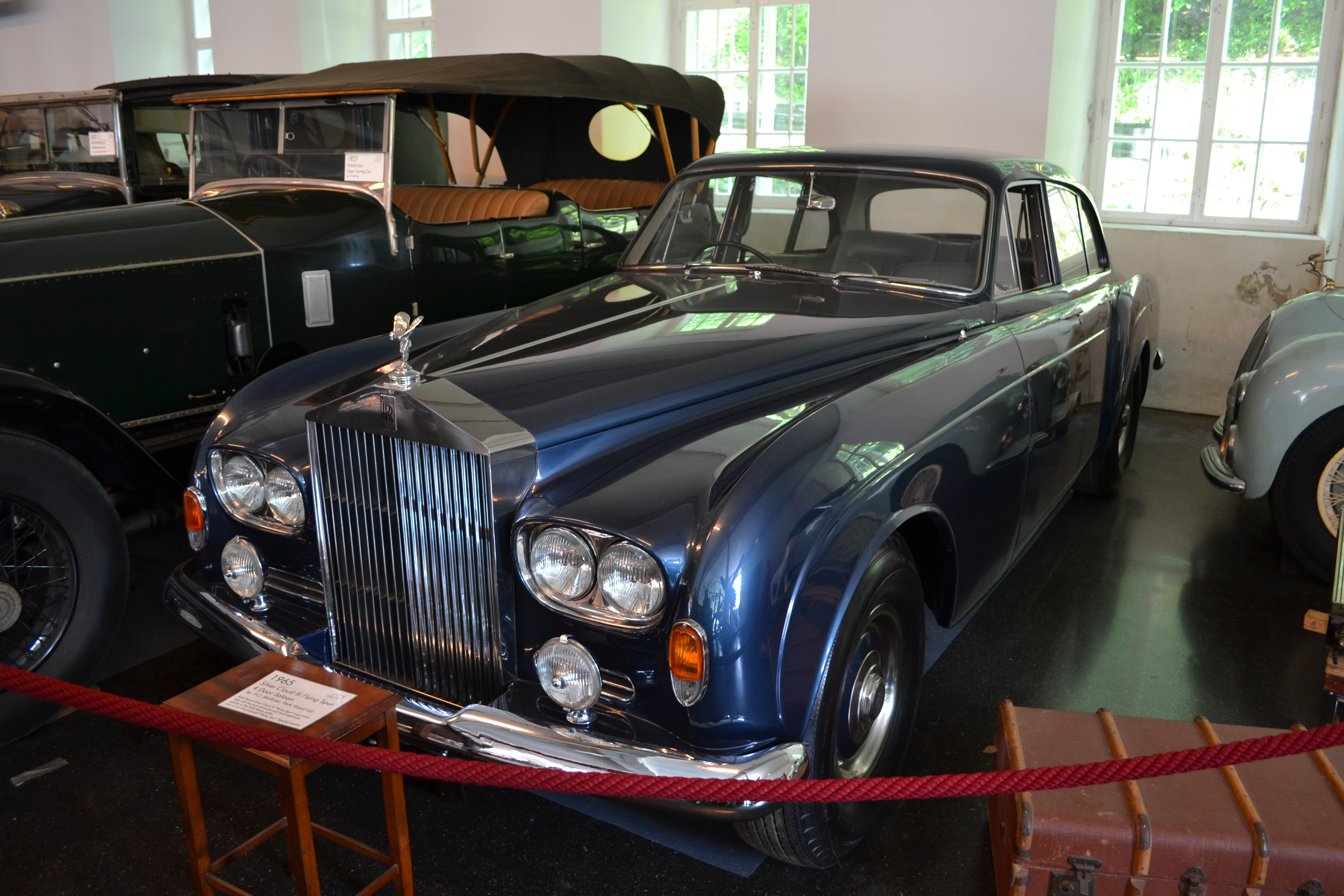 A Rolls-Royce Múzeum Dornbirnban